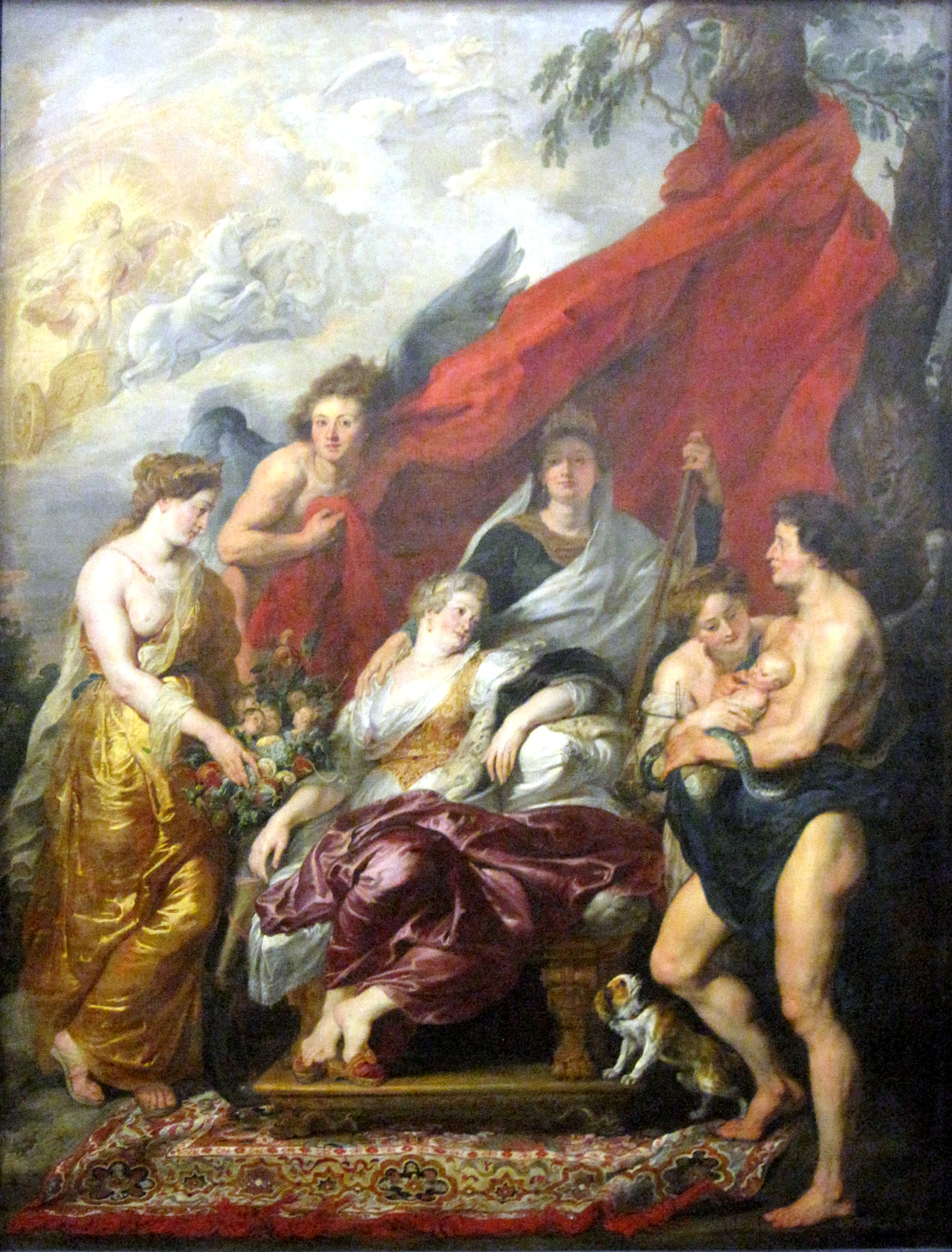 Peinture fiamande au Louvre, Paris